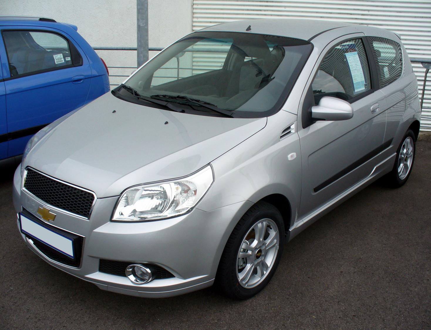 Chevrolet Aveo Dreitürer